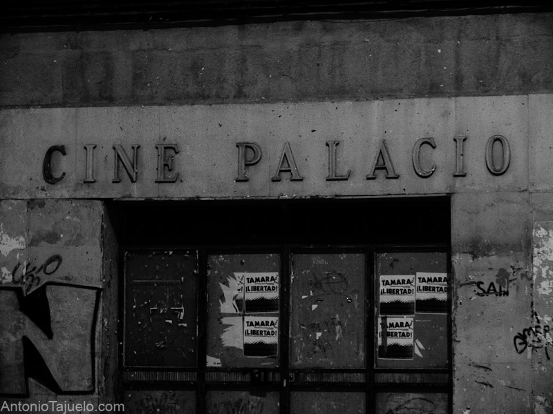 Getafe en Blanco y Negro Puedes ver la entrada completa en